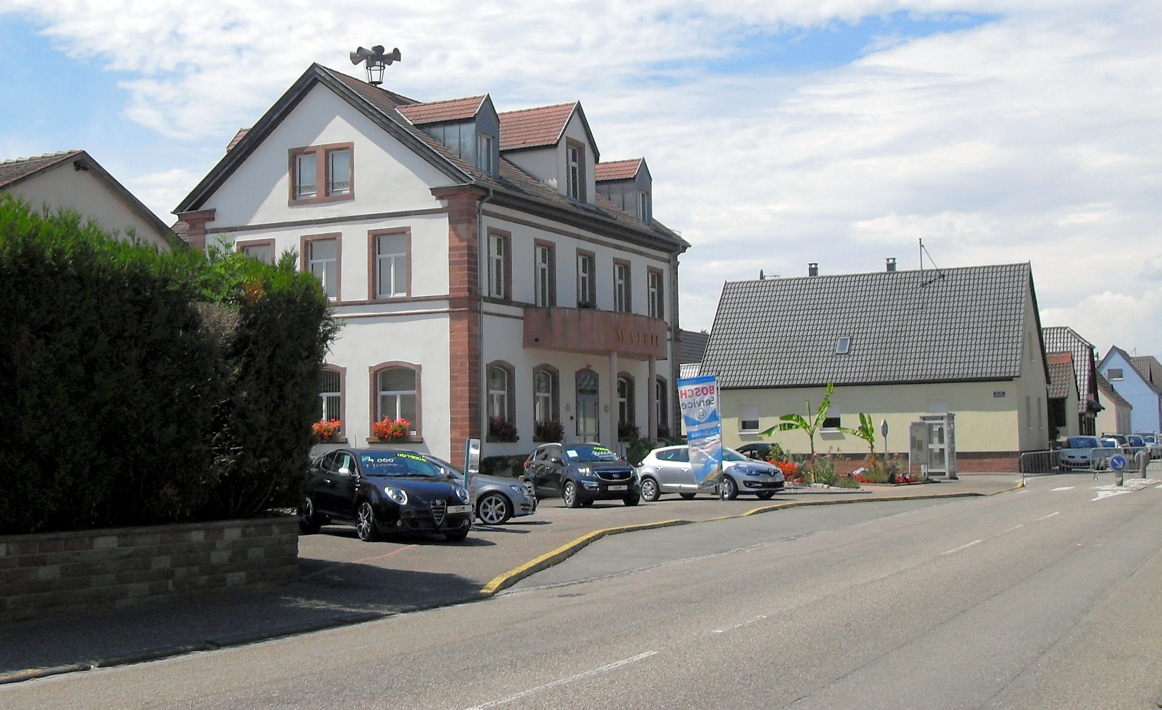 La mairie de Schirrhein